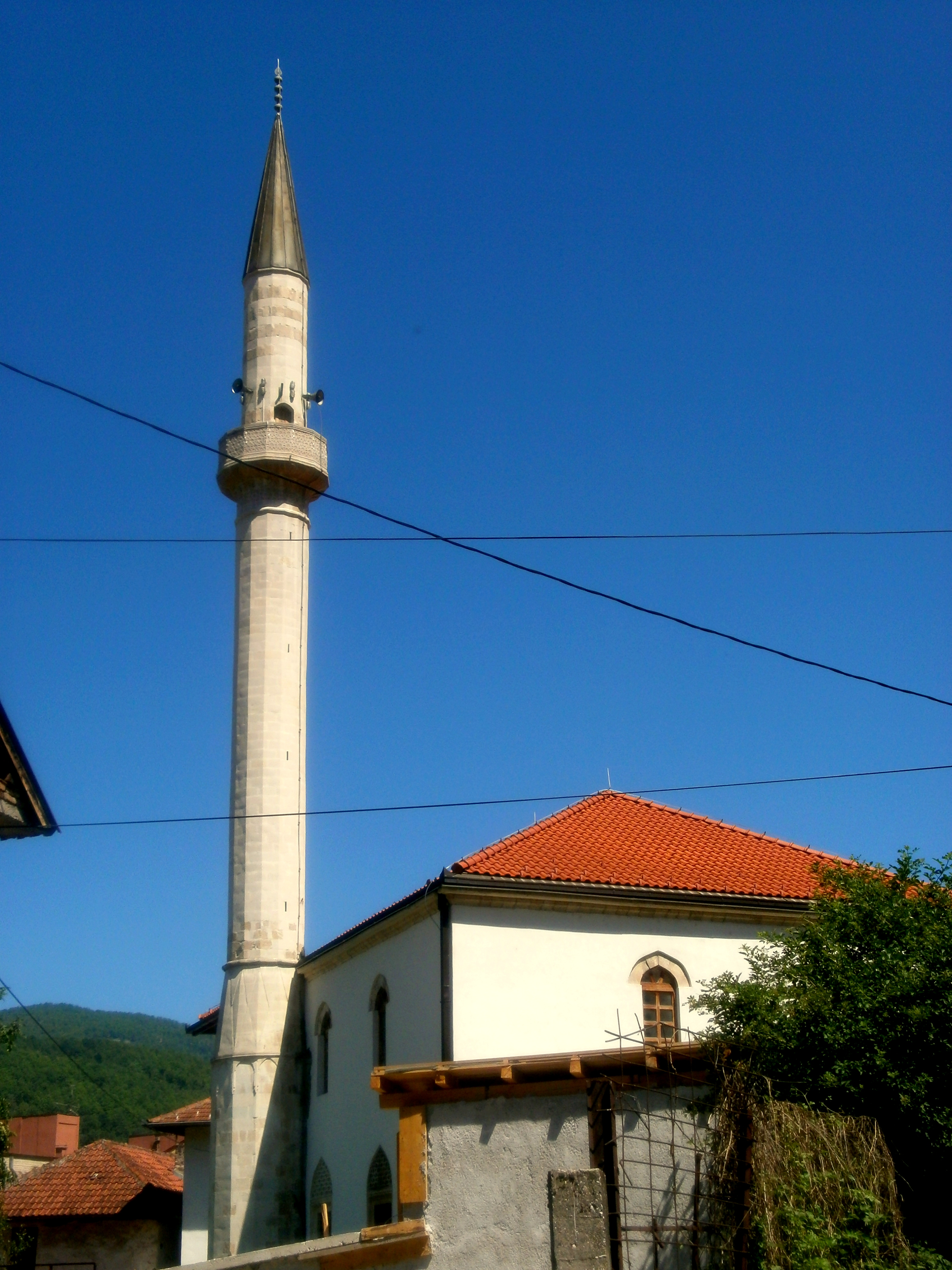 Муслук (Атик Али-пашина) џамија This image was uploaded as part of Trace of Soul 2015.